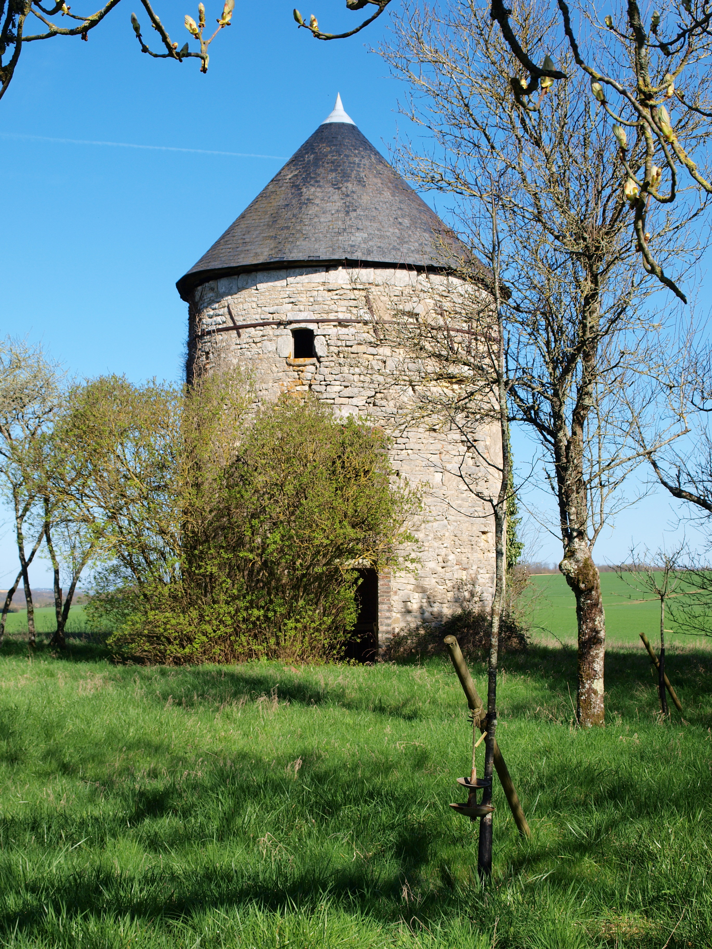 Le Boichet à Thury (Yonne, France)